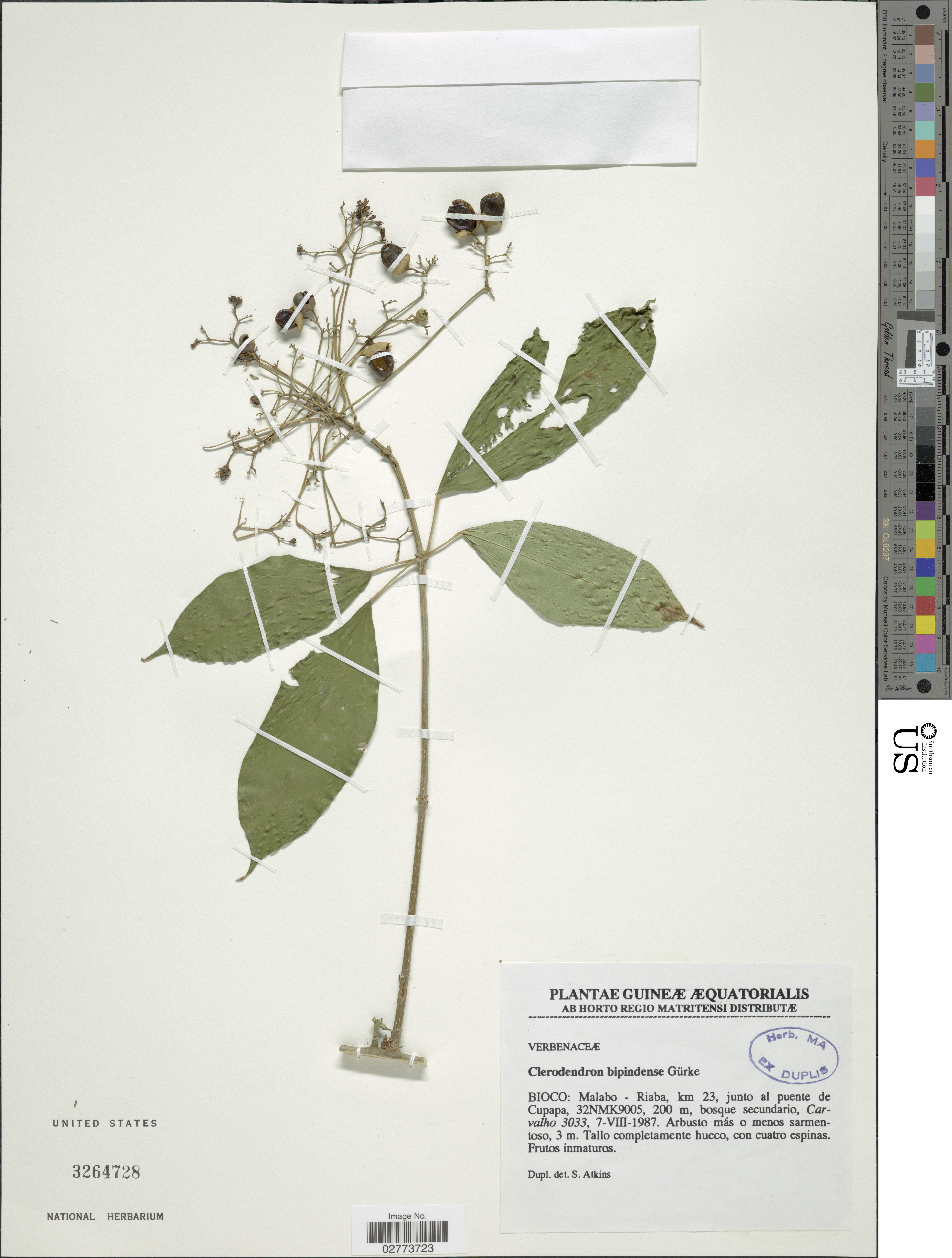 Clerodendrum bipindense Gürke Object Details Record Last Modified 17 Mar 2018 Specimen Count 1 Collection Date 7 Aug 1987 Barcode 02773723 USNM Number 3264728 Biogeographical Region 23 - West-Central Tropical Africa Collector Carvalho, -- Min. Elevation 200 Place Bioco: Malabo-Riaba, km 23, junto al puente de Cupapa, 32NMK9005., Equatorial Guinea, Africa Published Name Clerodendrum bipindense Gürke Taxonomy Plantae Dicotyledonae Lamiales Lamiaceae NMNH - Botany Dept. Record ID nmnhbotany_13878232 Metadata Usage CC0